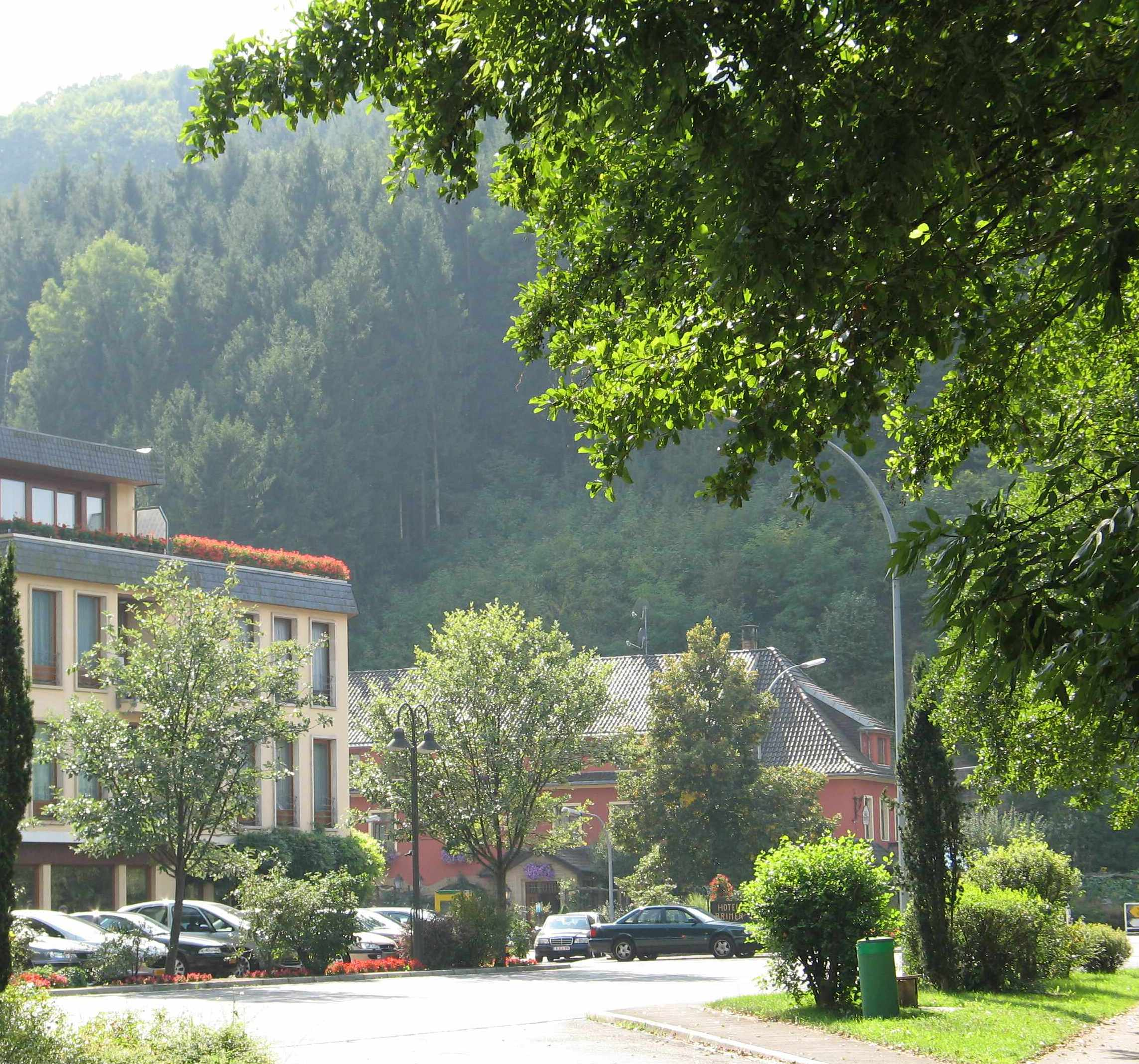 Grondhaff.